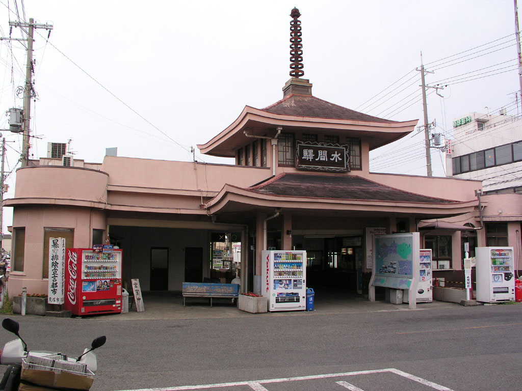 水間鉄道水間駅 駅舎 機材：C5050Z 撮影後リサイズ Category:鉄道駅画像ja:Category:水間鉄道の画像ja:Category:貝塚市の画像